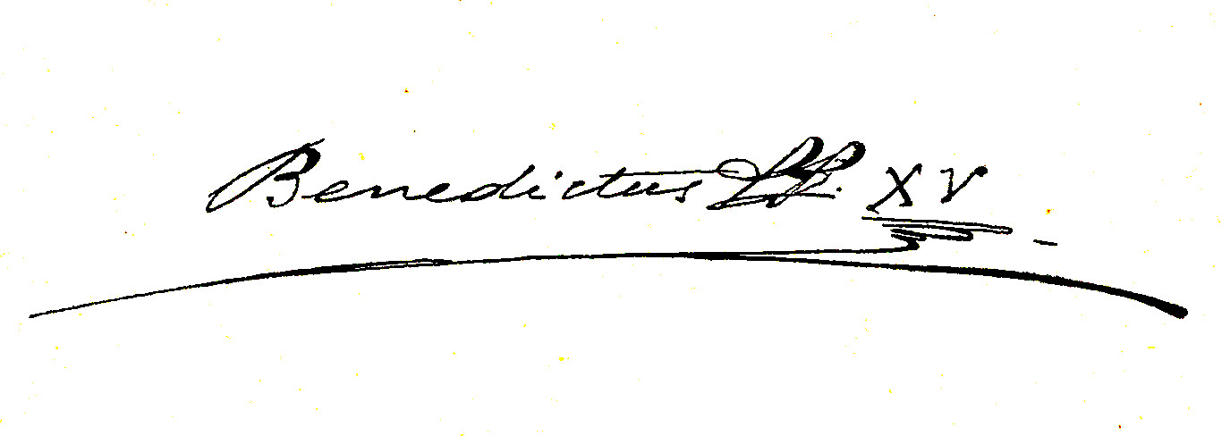 Signature du pape Benoît XV